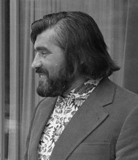 Bundeskanzler Willy Brandt empfängt Filmschauspieler